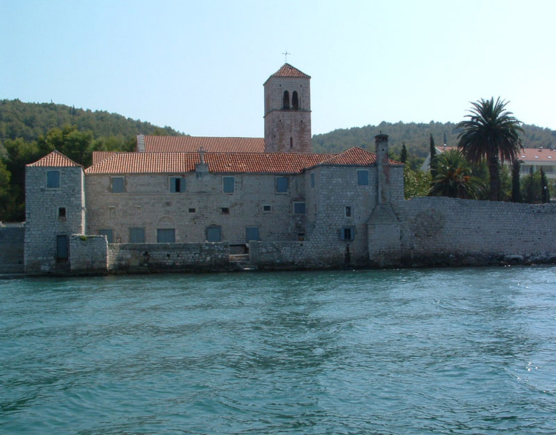 Sveti Križ (Arbanija) auf der Insel ČiovoSv. Križ monastery in Arbanija